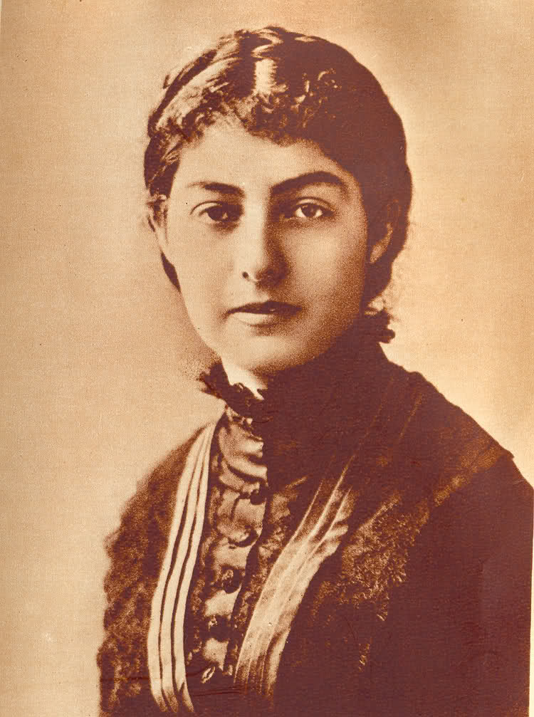 Srpska kraljica Natalija Obrenović (1859-1941), žena Kralja Milana I Obrenovića, majka Kralja Aleksandra Obrenovića